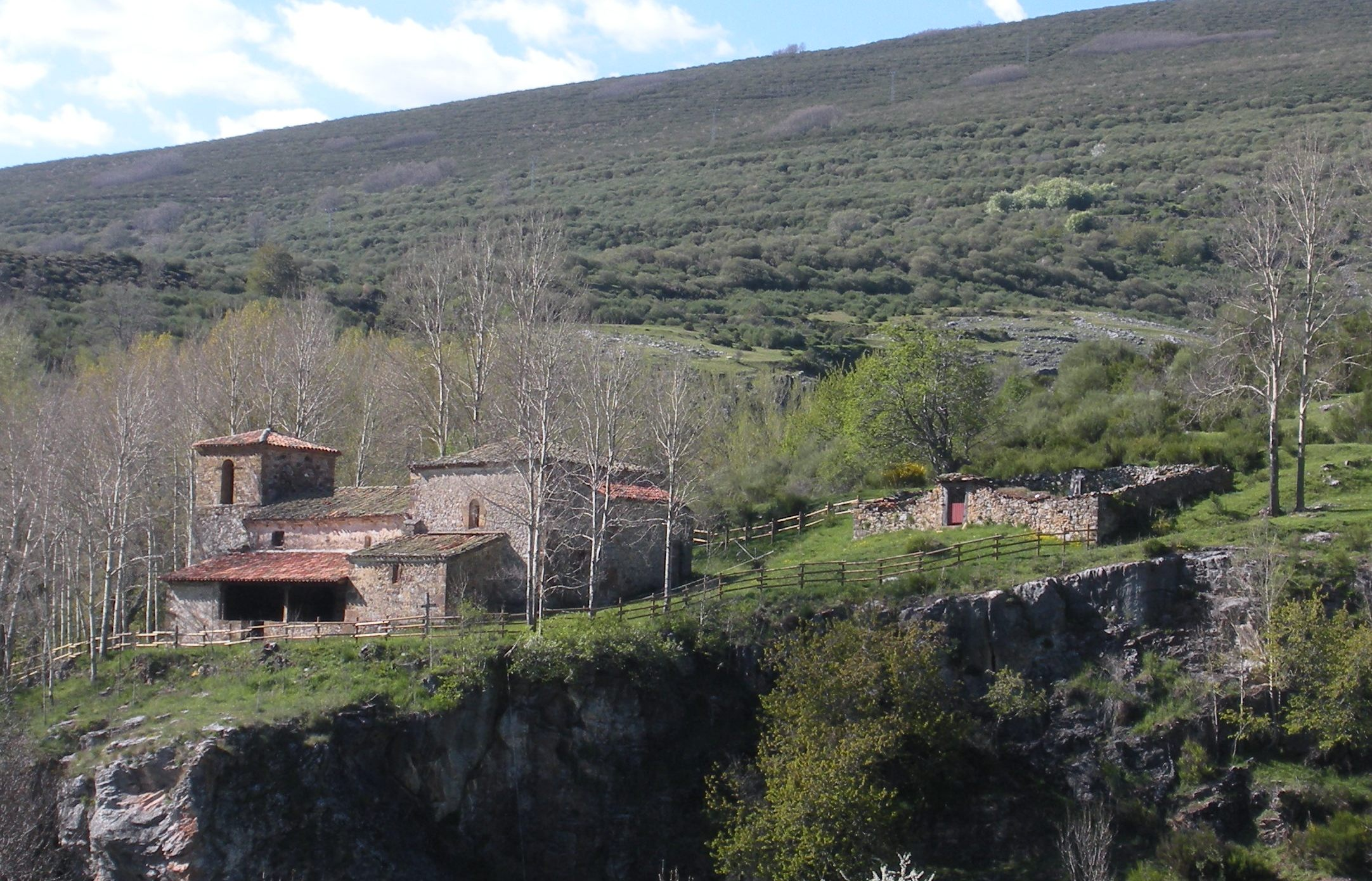 Iglesia y cementerio de la localidad de Valcobero, en la provincia de Palencia (España)